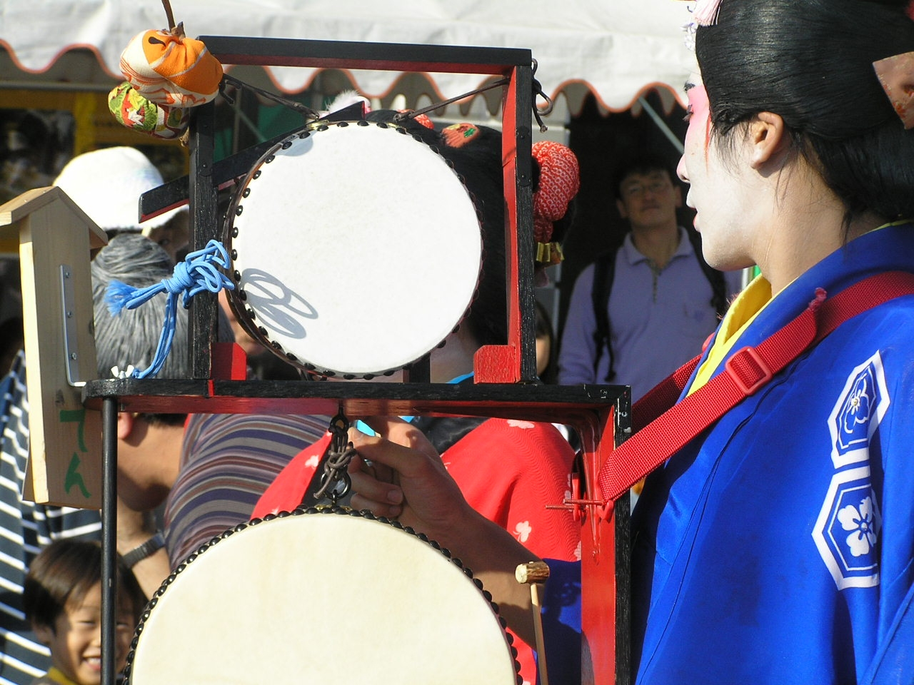 ちんどん屋 Ding-dong band